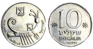 Израильские 10 шекелей 1982 года выпуска. Аверс и реверс.